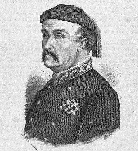 Militar carlista